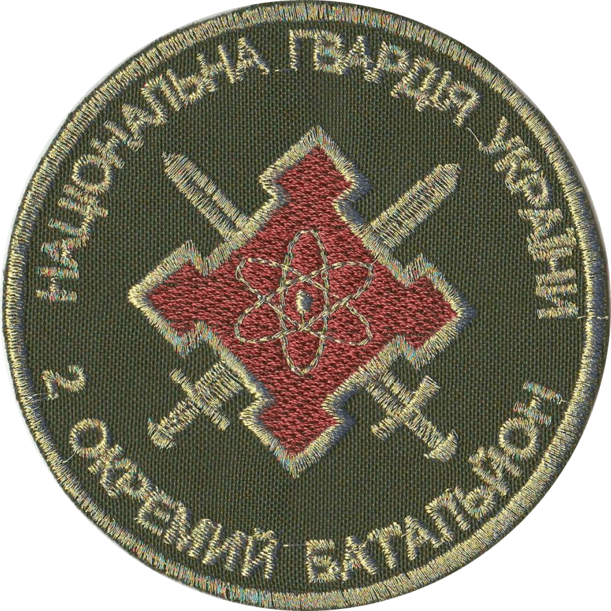 Нарукавный знак 2-й отдельный батальон охраны особо важных государственных объектов НГУ (3042, Энергодар)